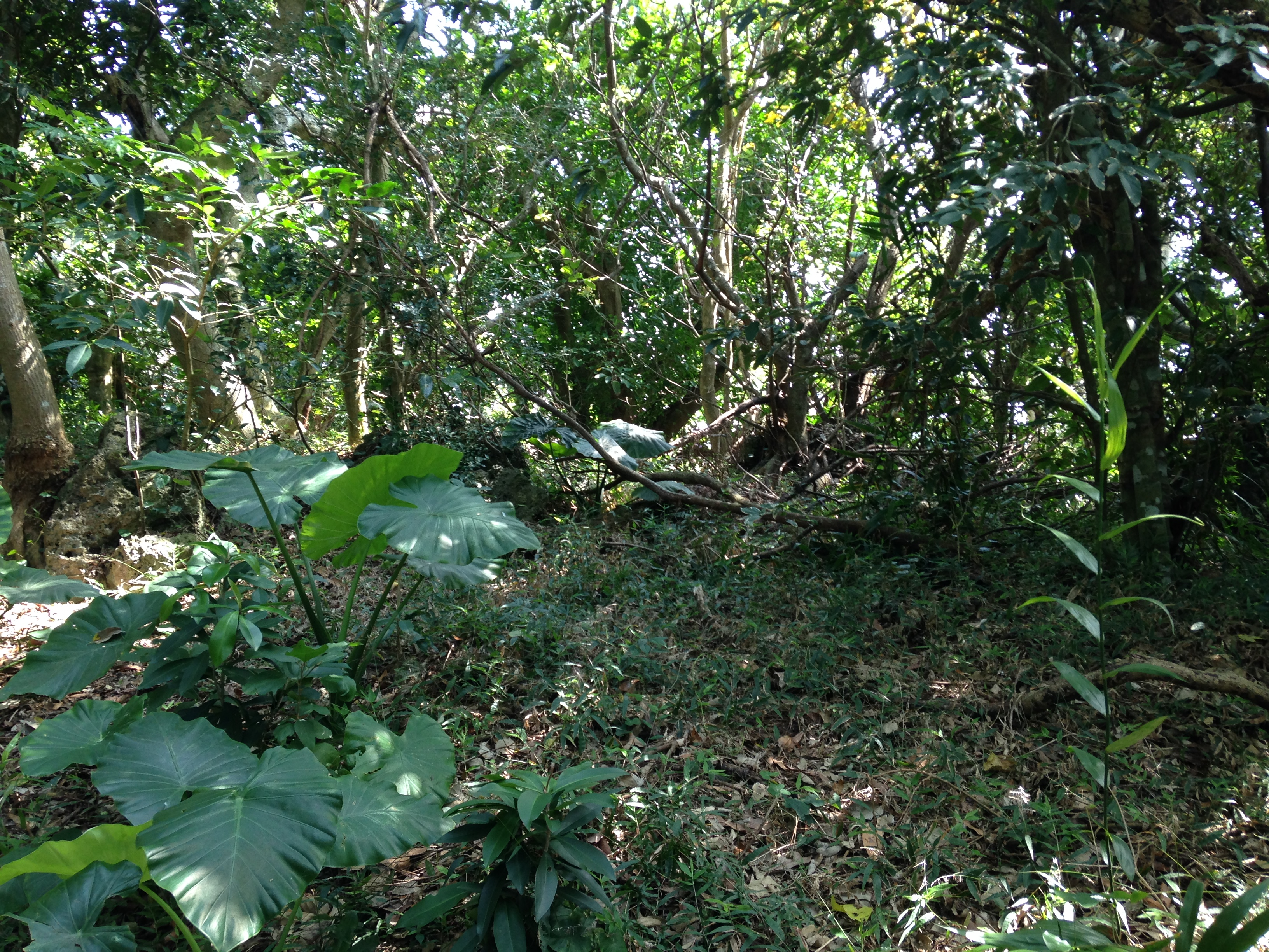 斎場御嶽の原始林